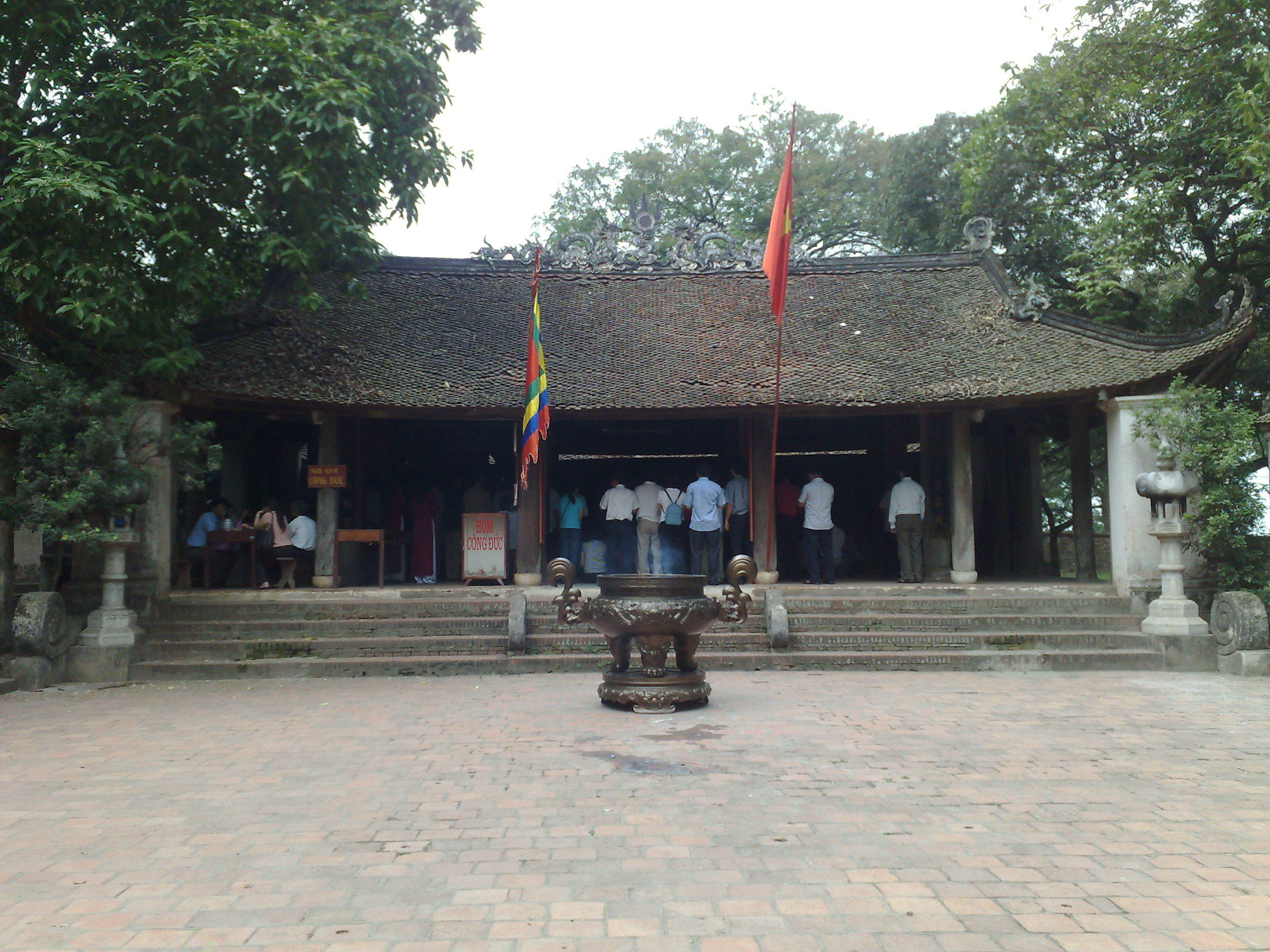 Nhà tiền tế đền Và, thị xã Sơn Tây, Hà Tây do tôi tự chụp và tải lên để minh hoạ cho bài viết Đền Và.